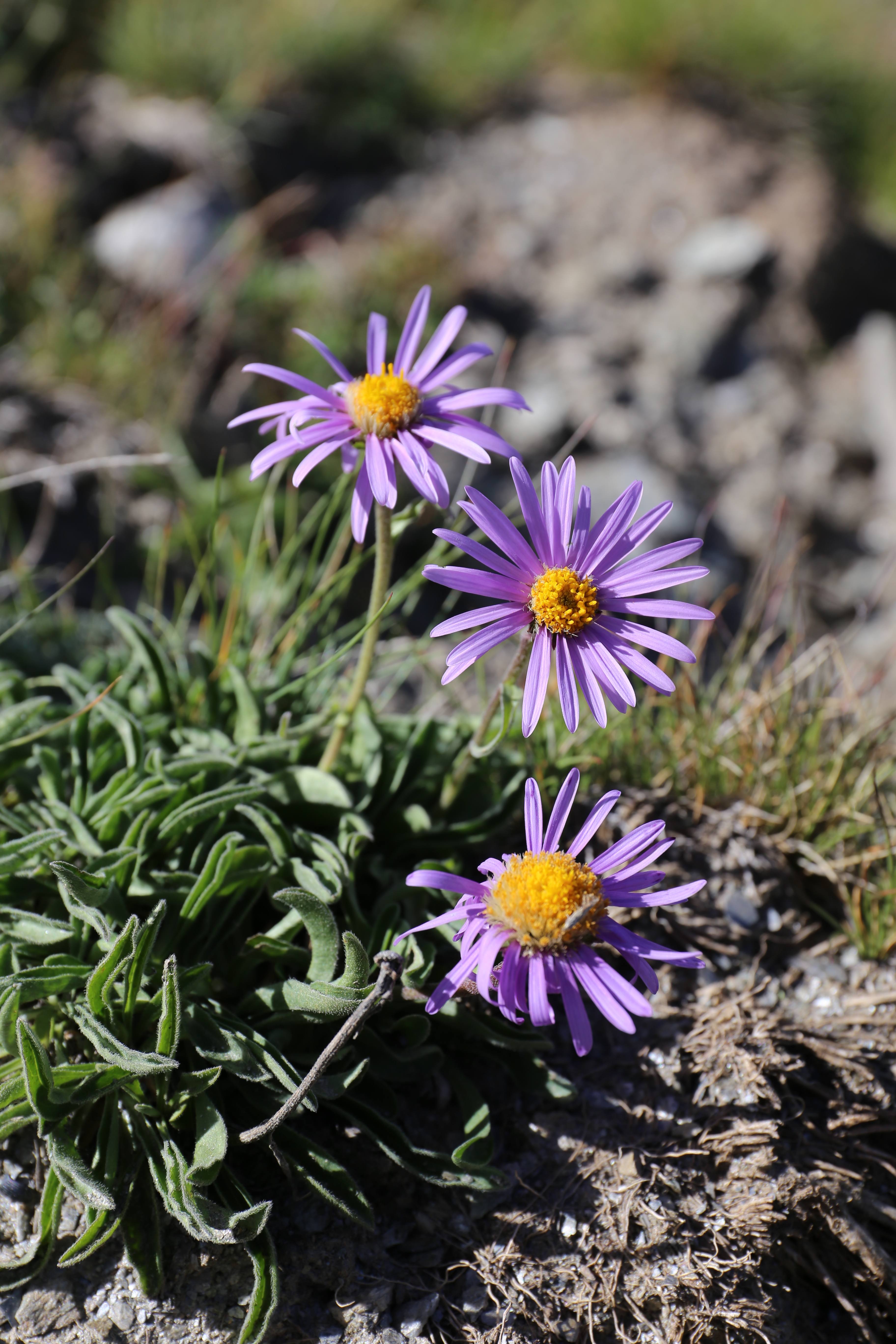 Astro alpino (Aster alpinus)